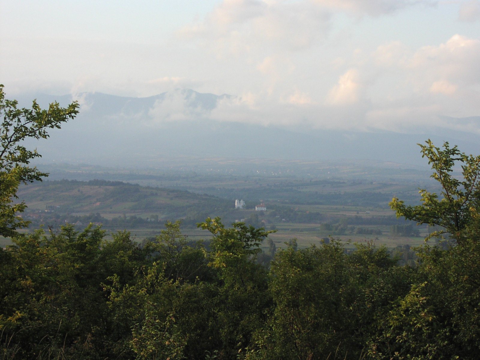 Village de Kondzelj. Photo prise d'une colline dans le village de Gojinovac. À l'arrière plan, le Jastrbac, au premier plan, des maisons du village de Gojinovac. Entre les deux villages se trouve la rivière Toplica.